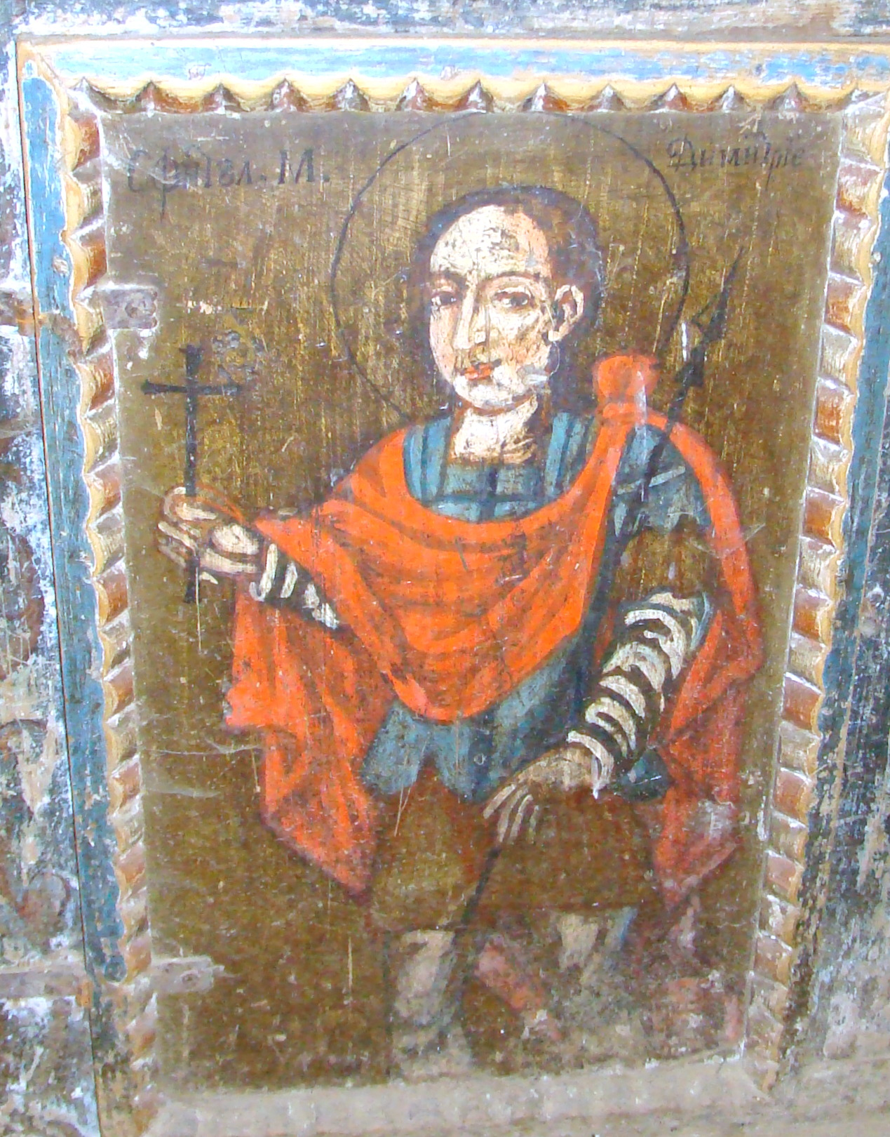 Biserica de lemn „Sf. Vasile cel Mare”, sat Dragu; comuna Dragu, judeţul Sălaj